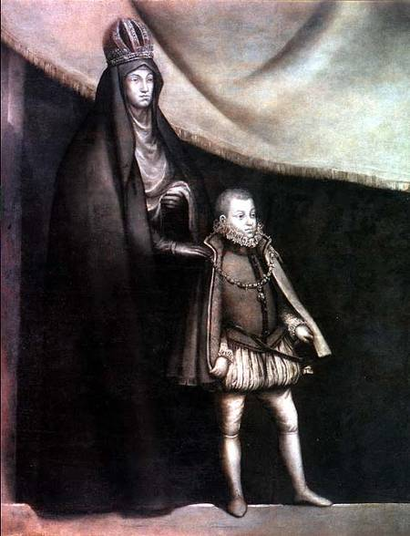 La obra representa a la emperatriz María de Austria (1528-1603), que fue hija del emperador Carlos I de España, junto a su sobrino, el príncipe Felipe de Austria (1578-1621), que era hijo del rey Felipe II de España y le sucedería en el trono como Felipe III.